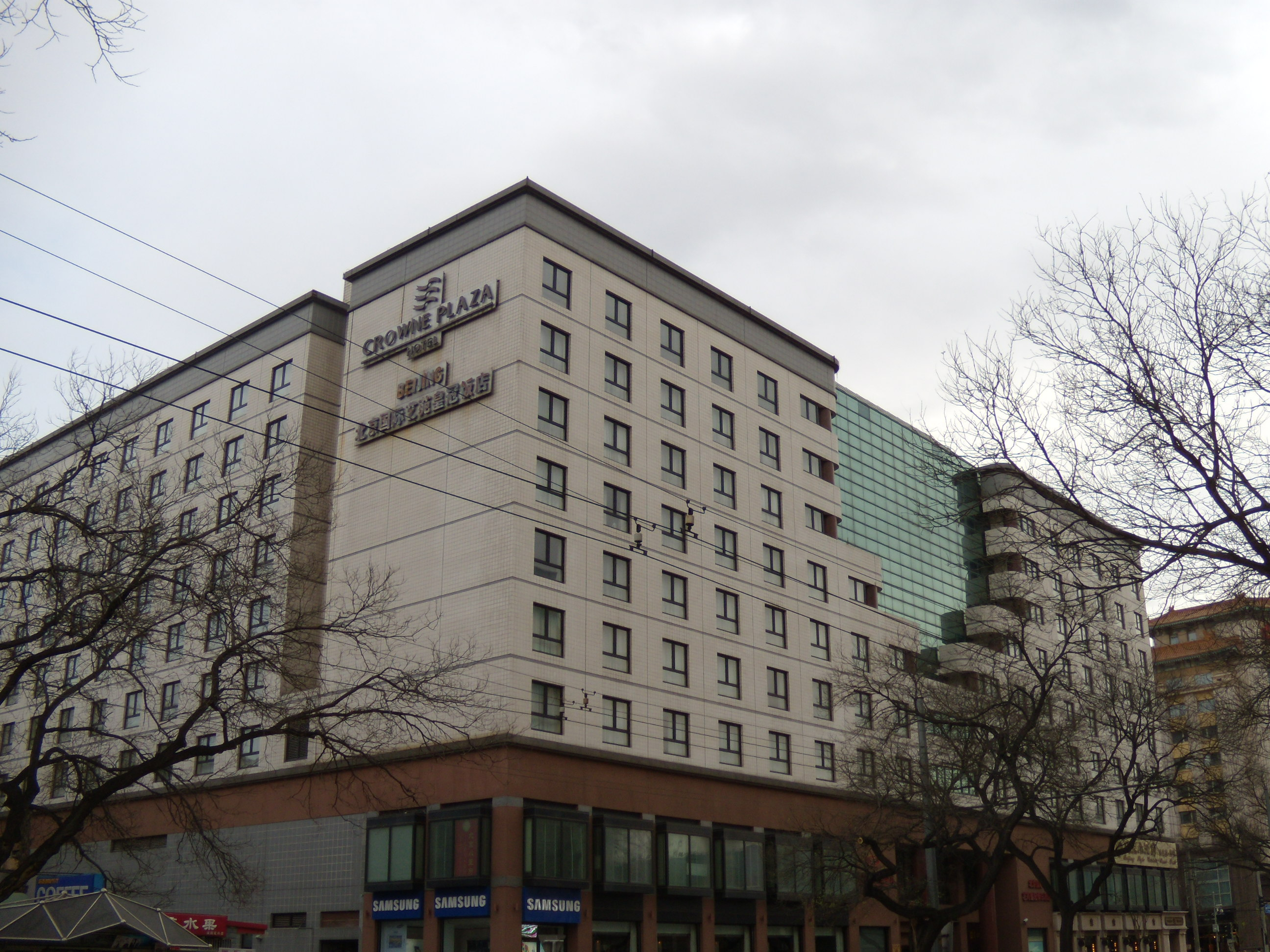 北京国际艺苑皇冠假日酒店，位于王府井大街